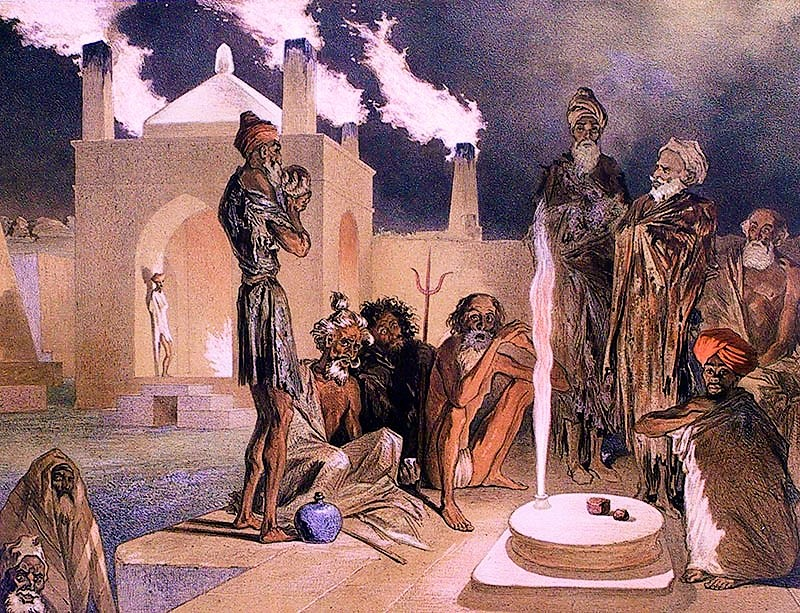 Bakou. Ateseh-Gah, Indiens adonnes au culte du feu.